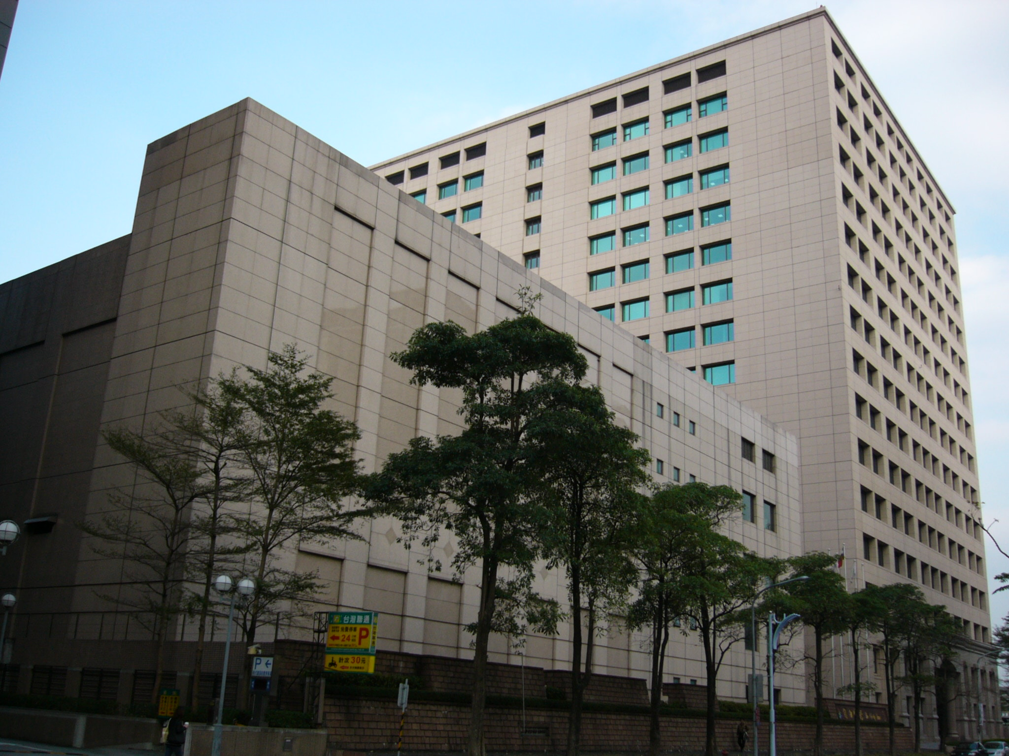 台北市內湖區瑞光路《自由時報》印刷廠（左）與《自由時報》第二代總社所在地「聯邦大樓自由廣場」（右）左前方外觀。